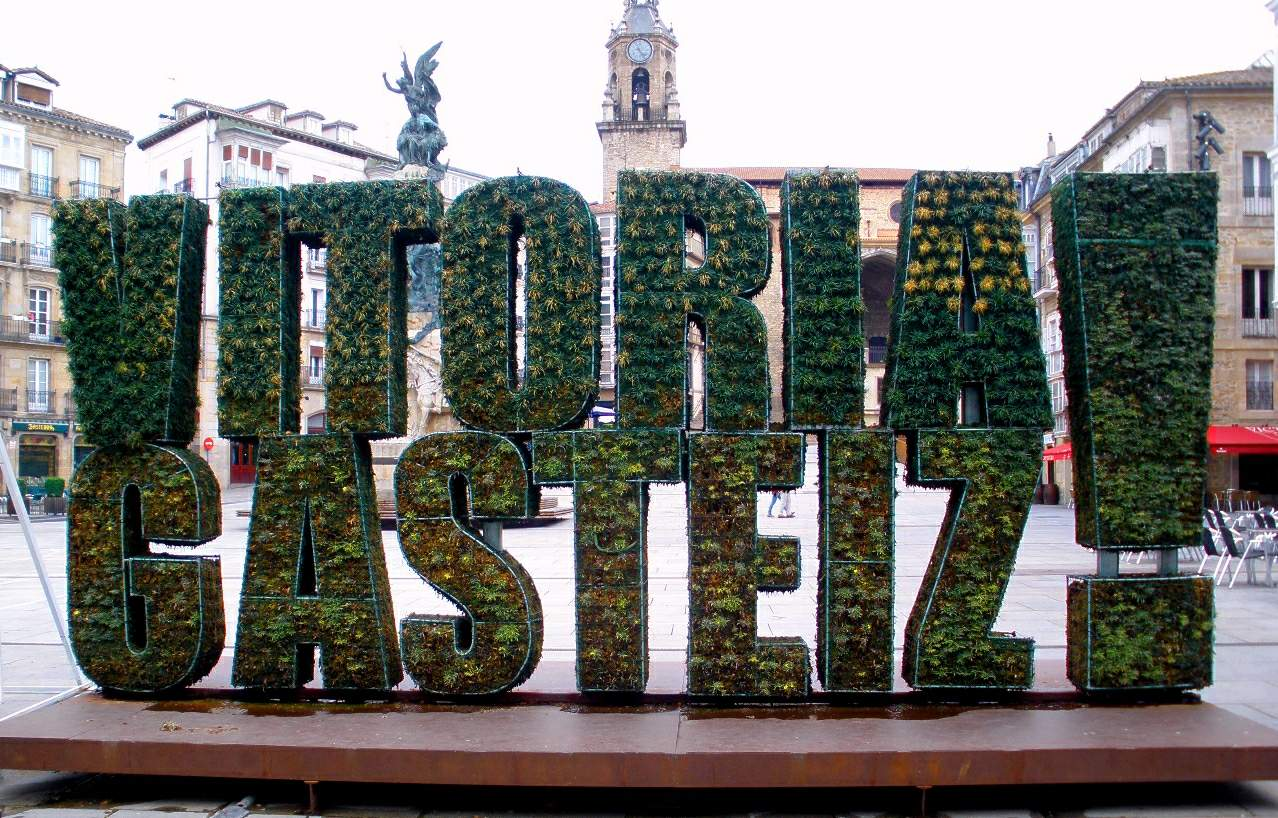 Símbolo de la European Green Capital 2012-2013, en la Plaza de la Virgen Blanca de Vitoria-Gasteiz